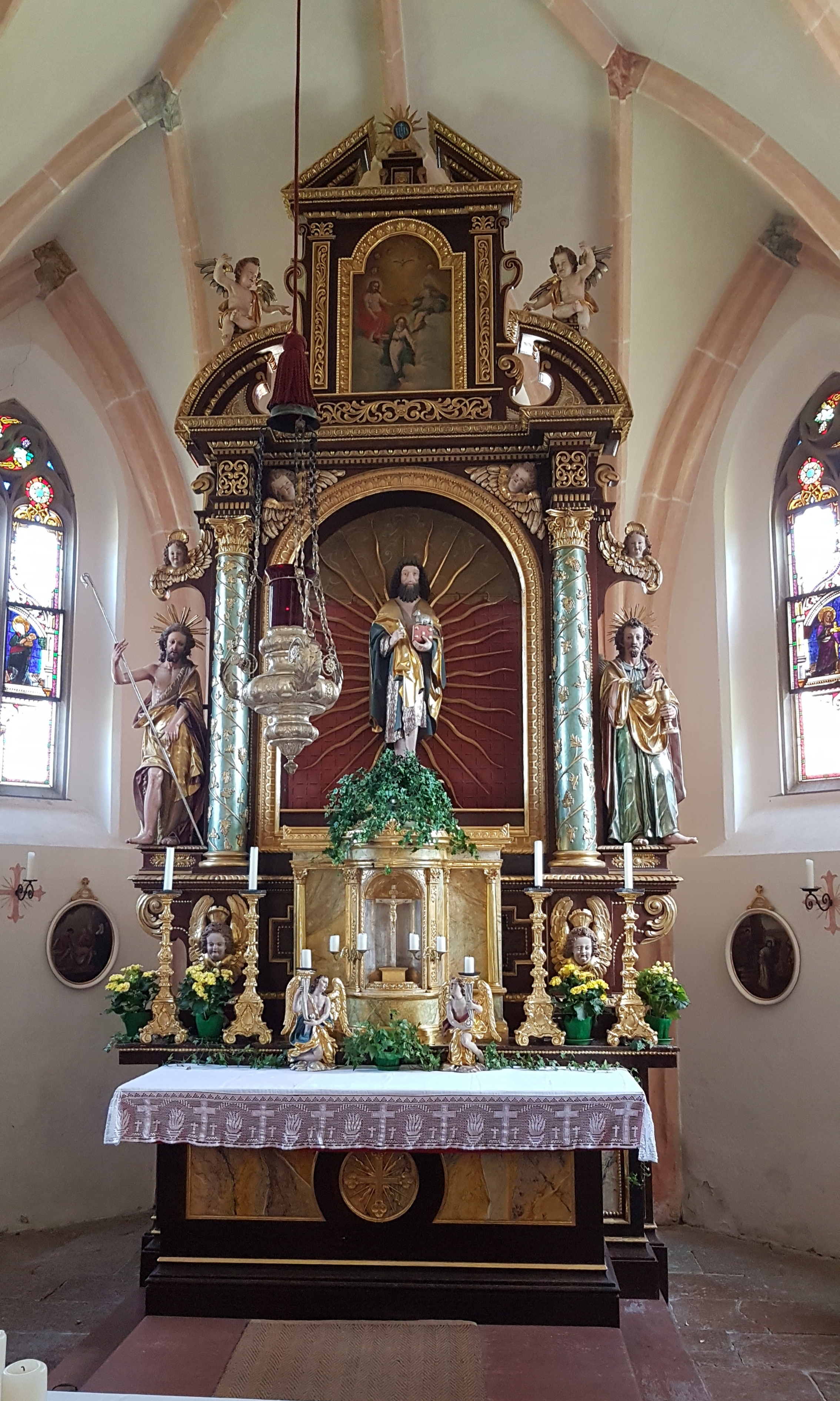 Mehring (Teisendorf), Filialkirche